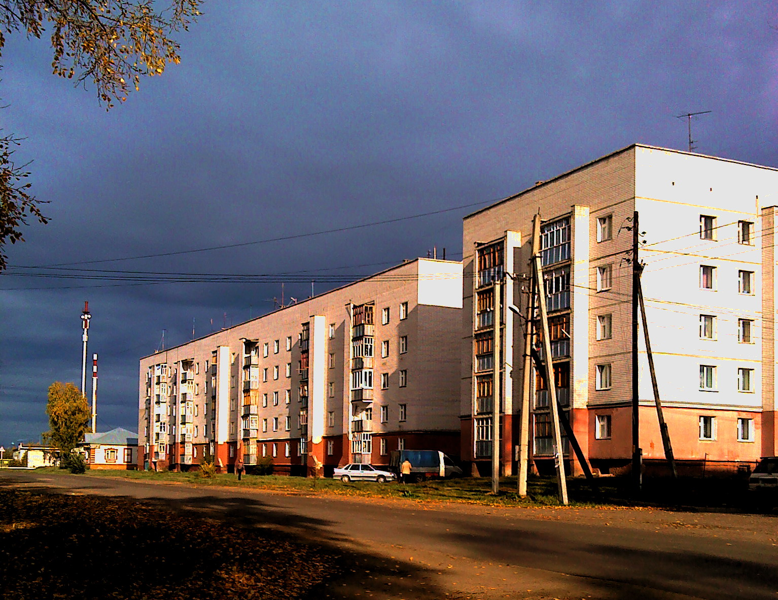 Васильево, ул.Октябрьская